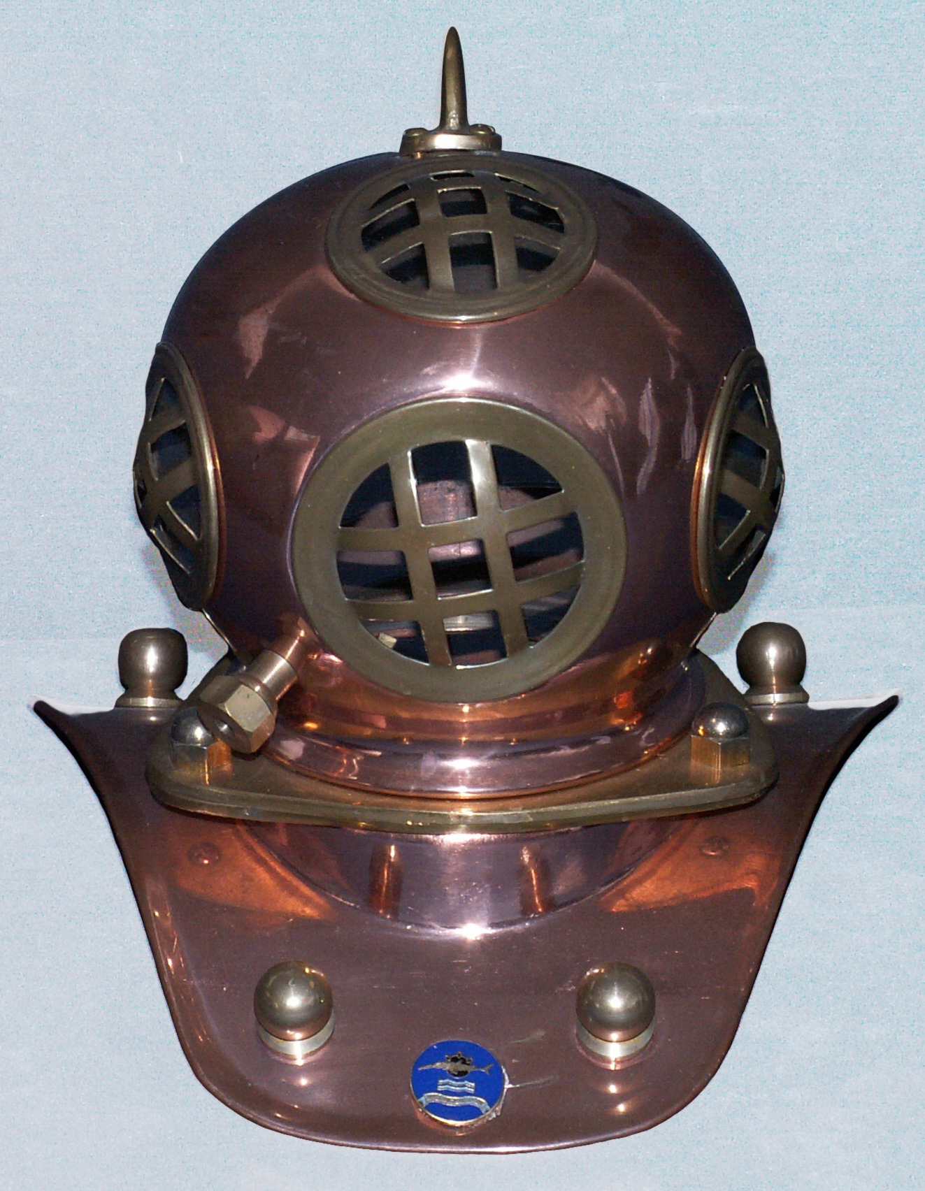 Own Work Taucherhelm mit Abzeichen der Minentaucherkompanie, Foto erstellt von Personaldisponent am 02.06.06